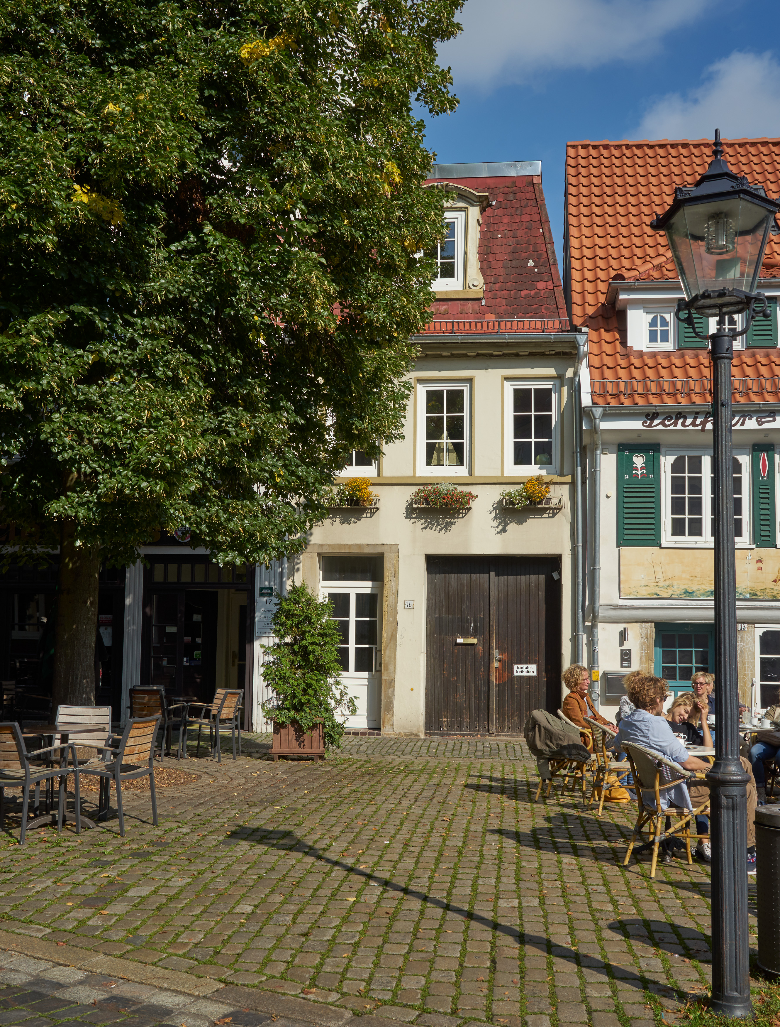 Wohnhaus in Bremen, Stavendamm 16Das abgebildete Objekt ist ein geschütztes Kulturdenkmal in der Freien Hansestadt Bremen, mit der Nr. 1484 beim Landesamt für Denkmalpflege registriert.